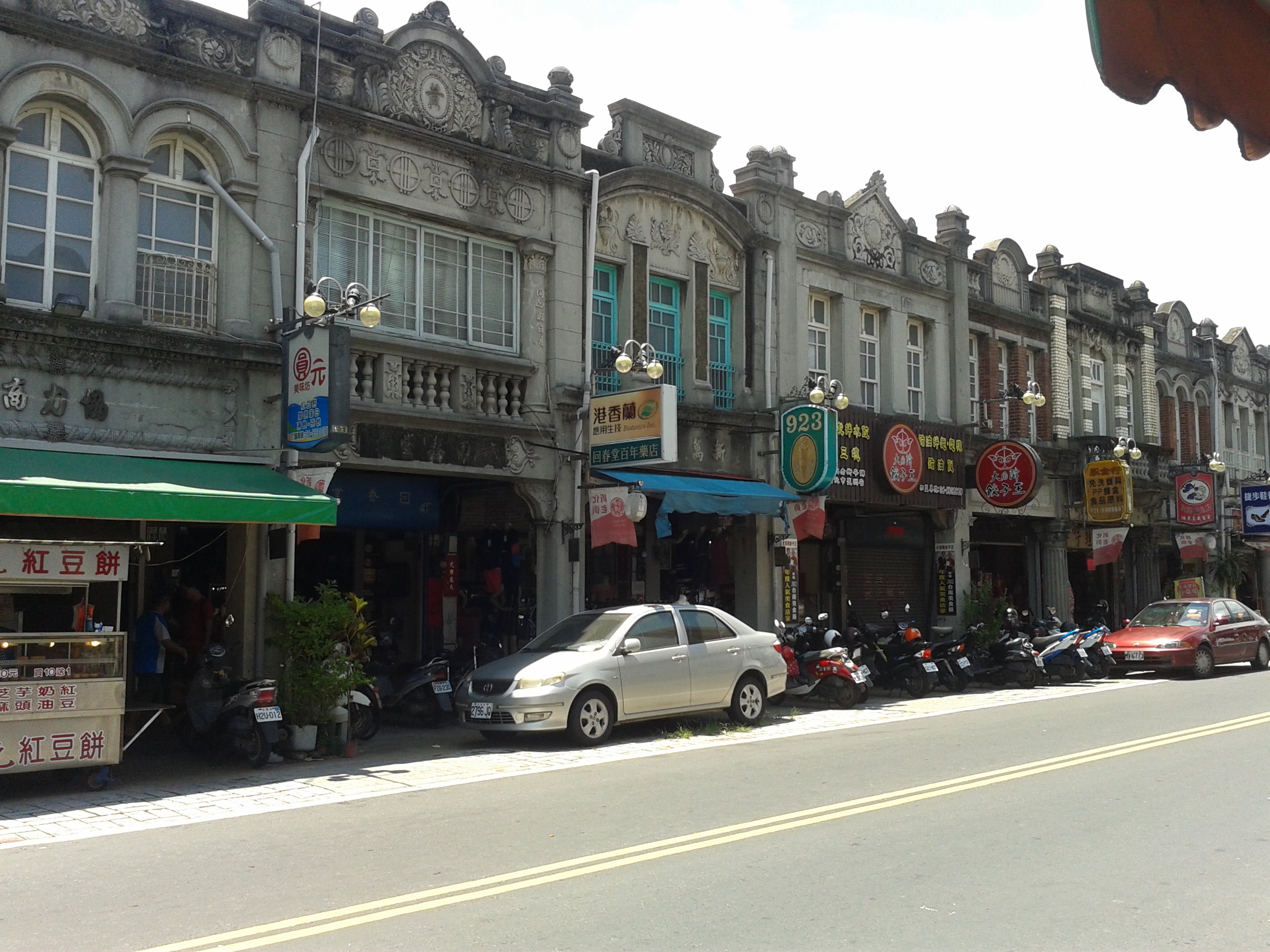 中正路與中山路的交會處周邊即是新化老街。